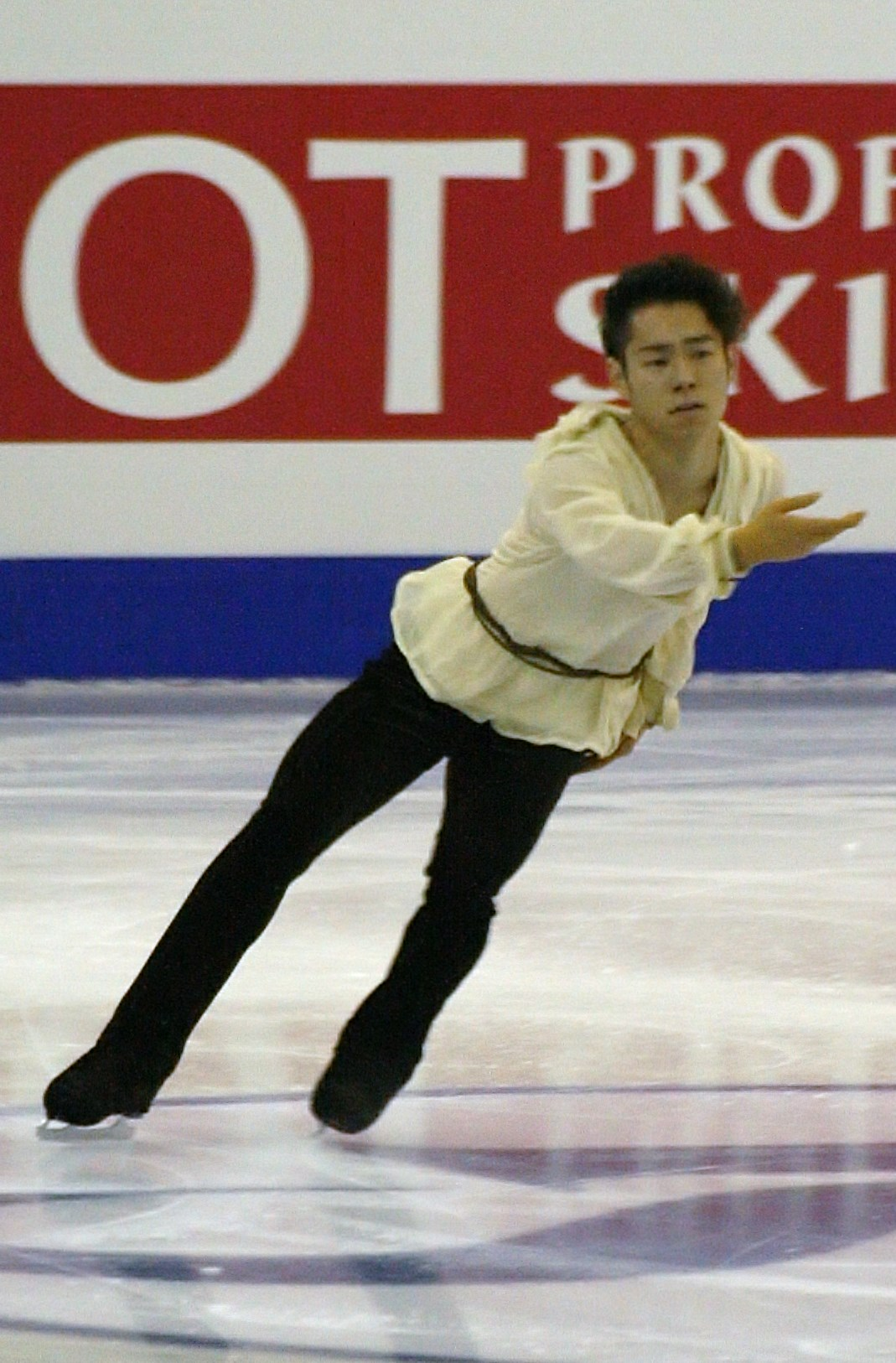 Дайсукэ Мураками (Япония) на финале Гран-при по фигурному катанию 2015-2016.